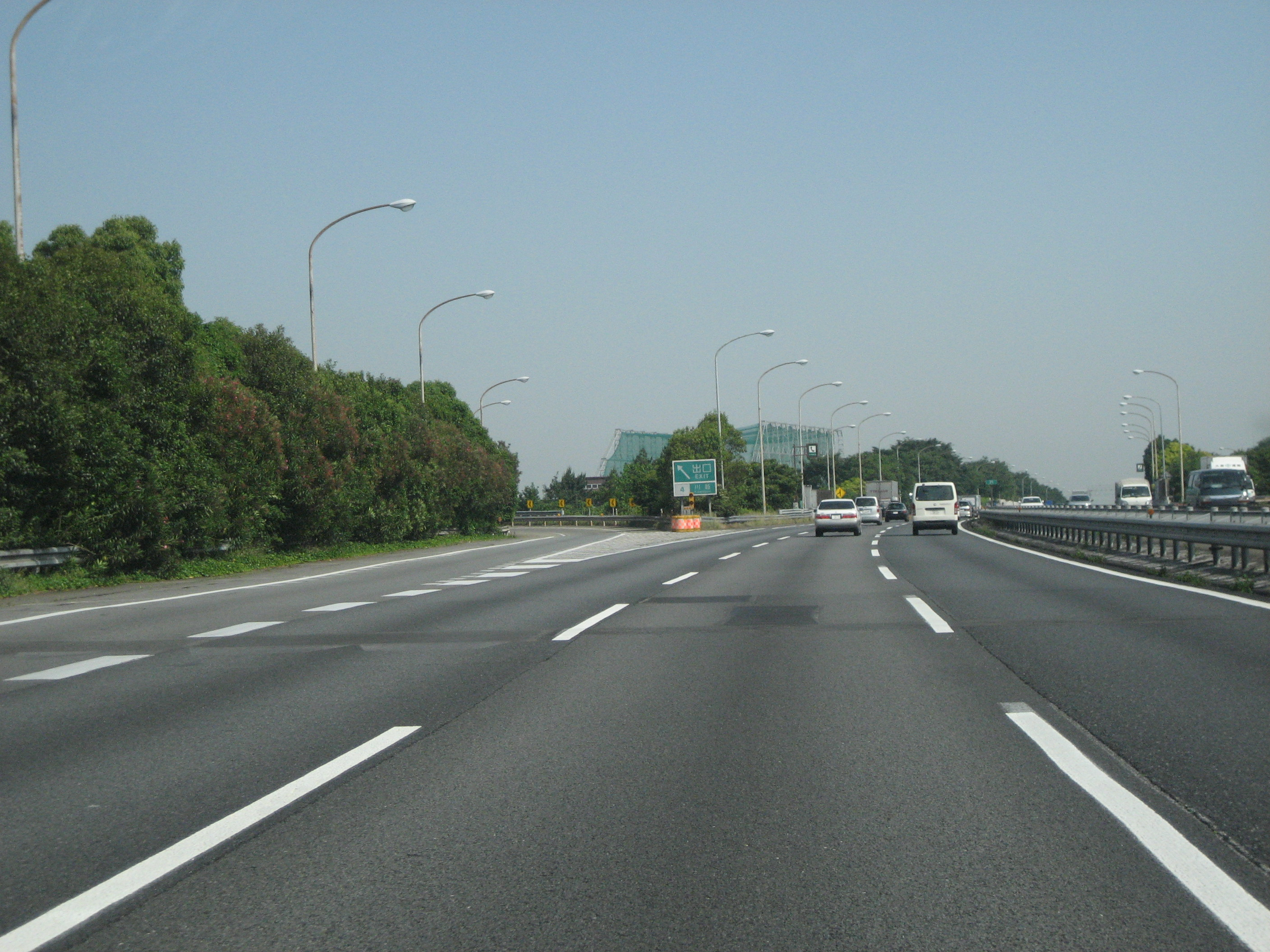 関越自動車道川越インターチェンジ（下り出口付近）